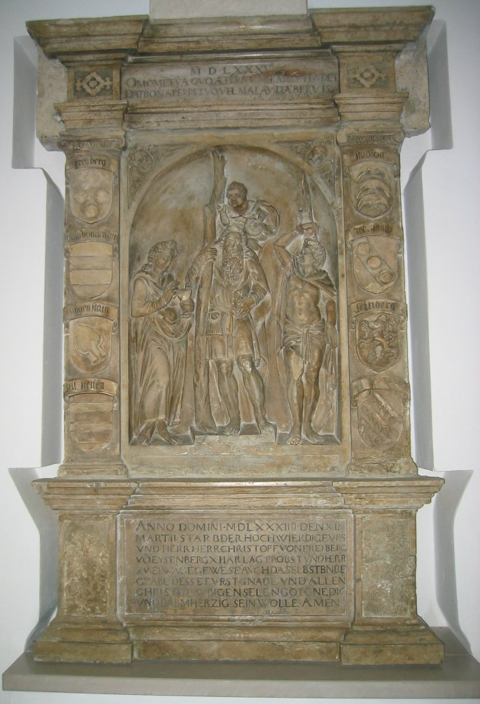 Epitaph des Fürstprobstes (Johann) Christoph von Freyberg-Eisenberg zu Hopferau, gest. 1584